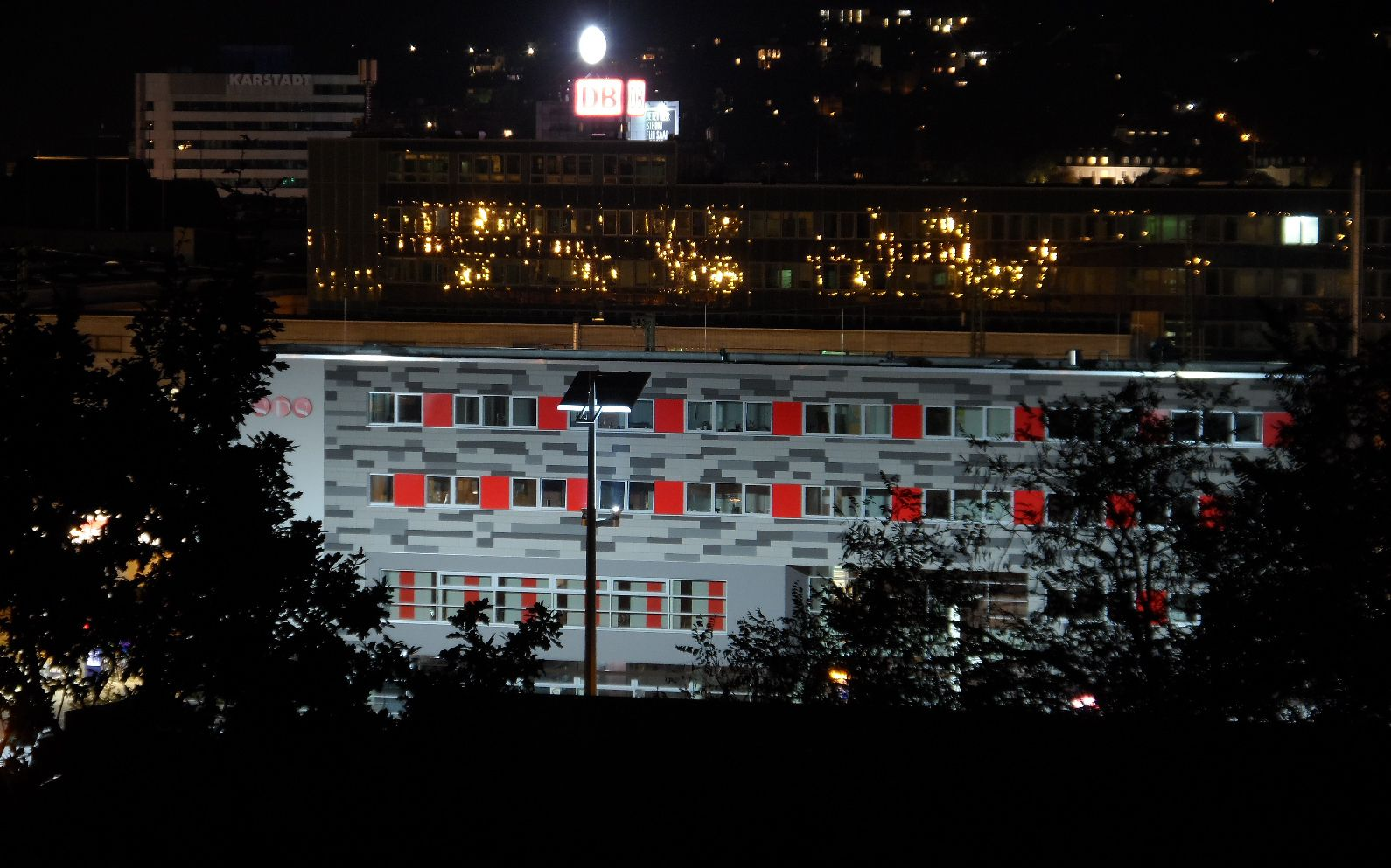 Das Akademiegebäude am Eurobahnhof bei Nacht